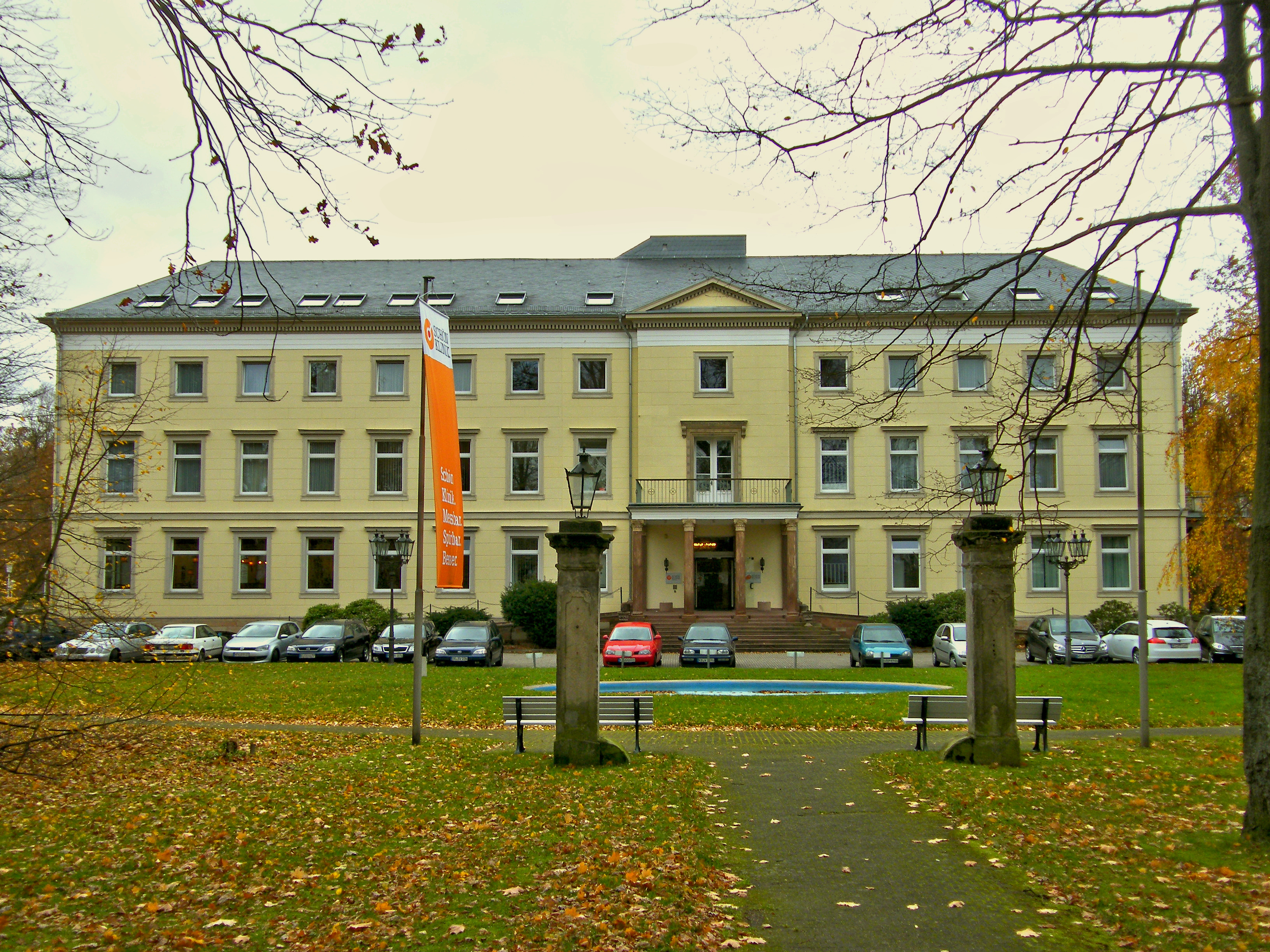 Das Neue Schloss in Bad Arolsen wurde von 1764 bis 1778 als Witwensitz für Fürstin Christiane von Waldeck und Pyrmont erbaut)